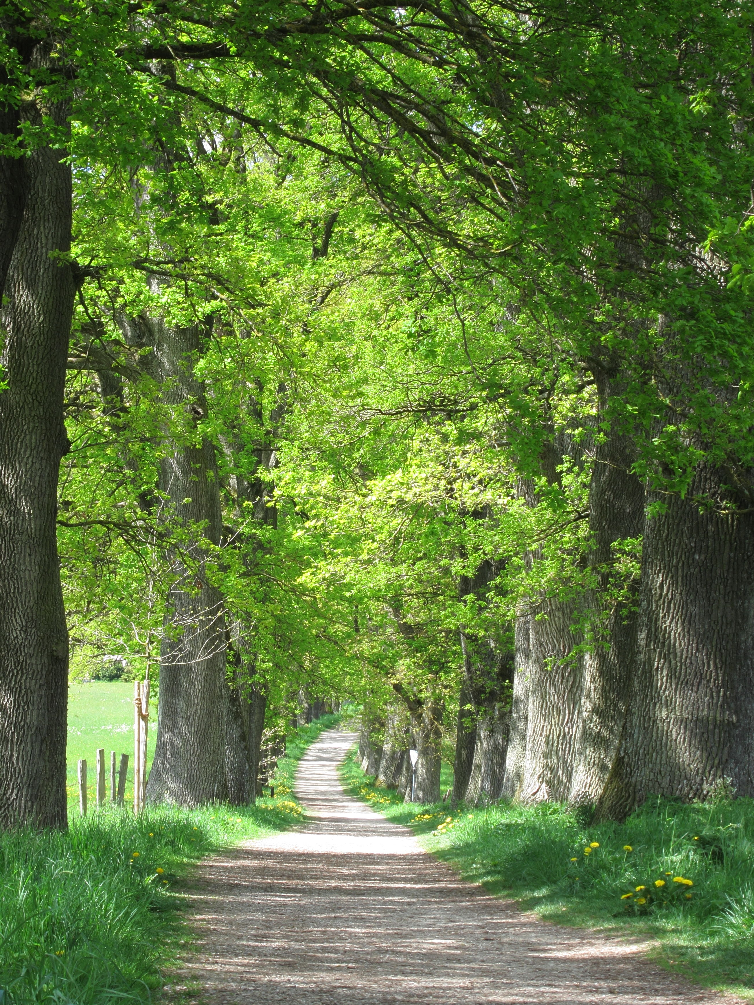 Egglsee, Eichenalleen und Zeilen von Eichenbäumen am Weg zum Ziegelhof, angelegt im 18. Jahrhundert durch das Kloster Ebersberg.